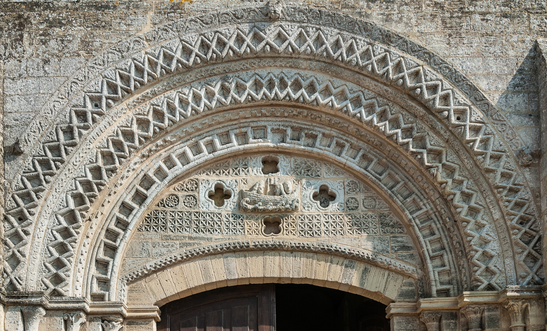 Église Saint-Pierre de Tour-en-Bessin, porte occidentale